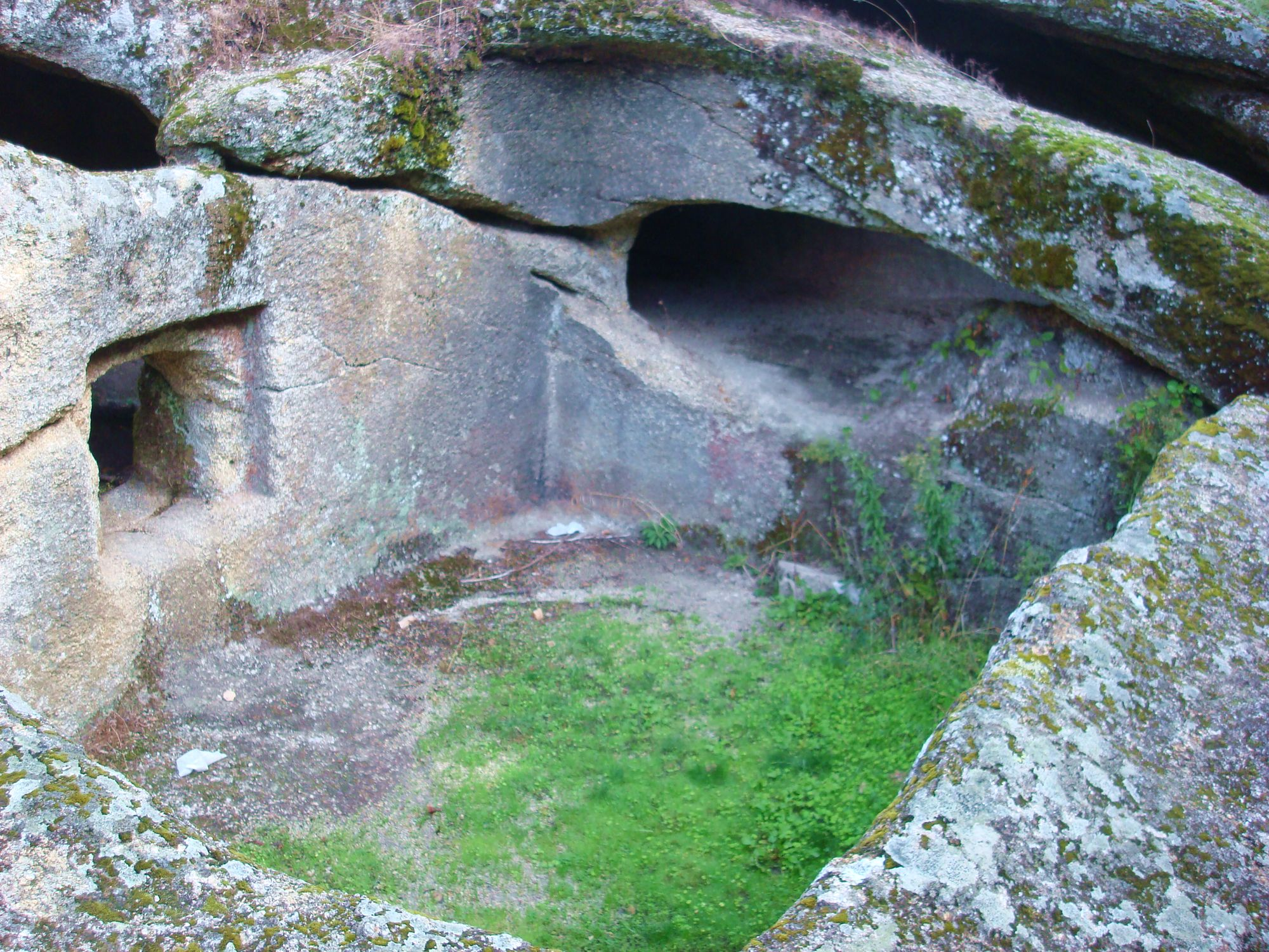 Il luogo è caratterizzato da un cortile quadrangolare al quale si accede tramite un arco in granito e, da qui, alle domus laterale e centrale.